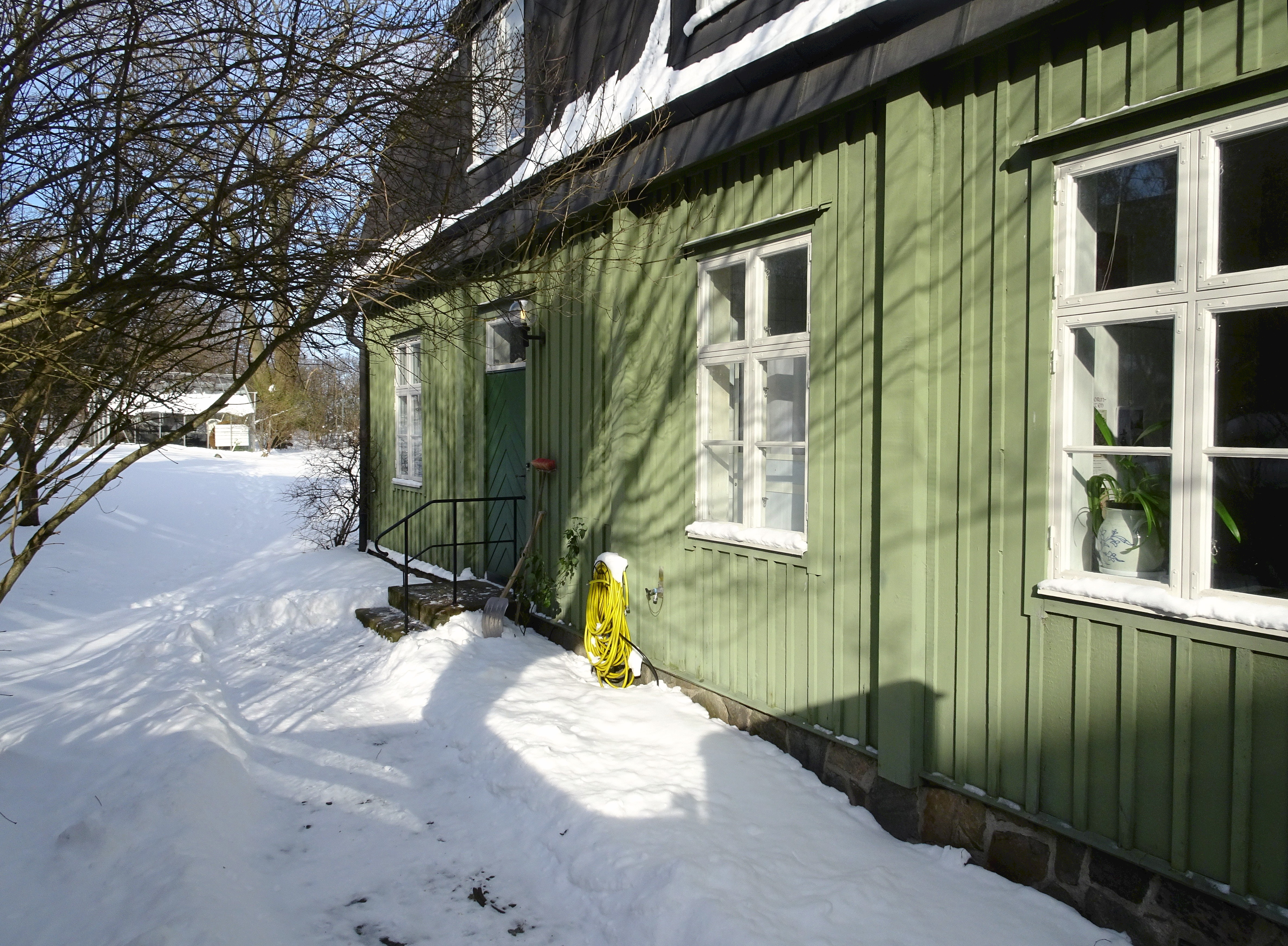 Gamla Lundagatan 6B, huset är hitflyttat 1967 och stod tidigare vid Lilla Fågelsången i Gröndal